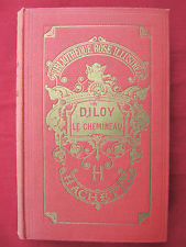 Comtesse de Ségur, Diloy le chemineau (1868), Hachette, Bibliothèque rose.